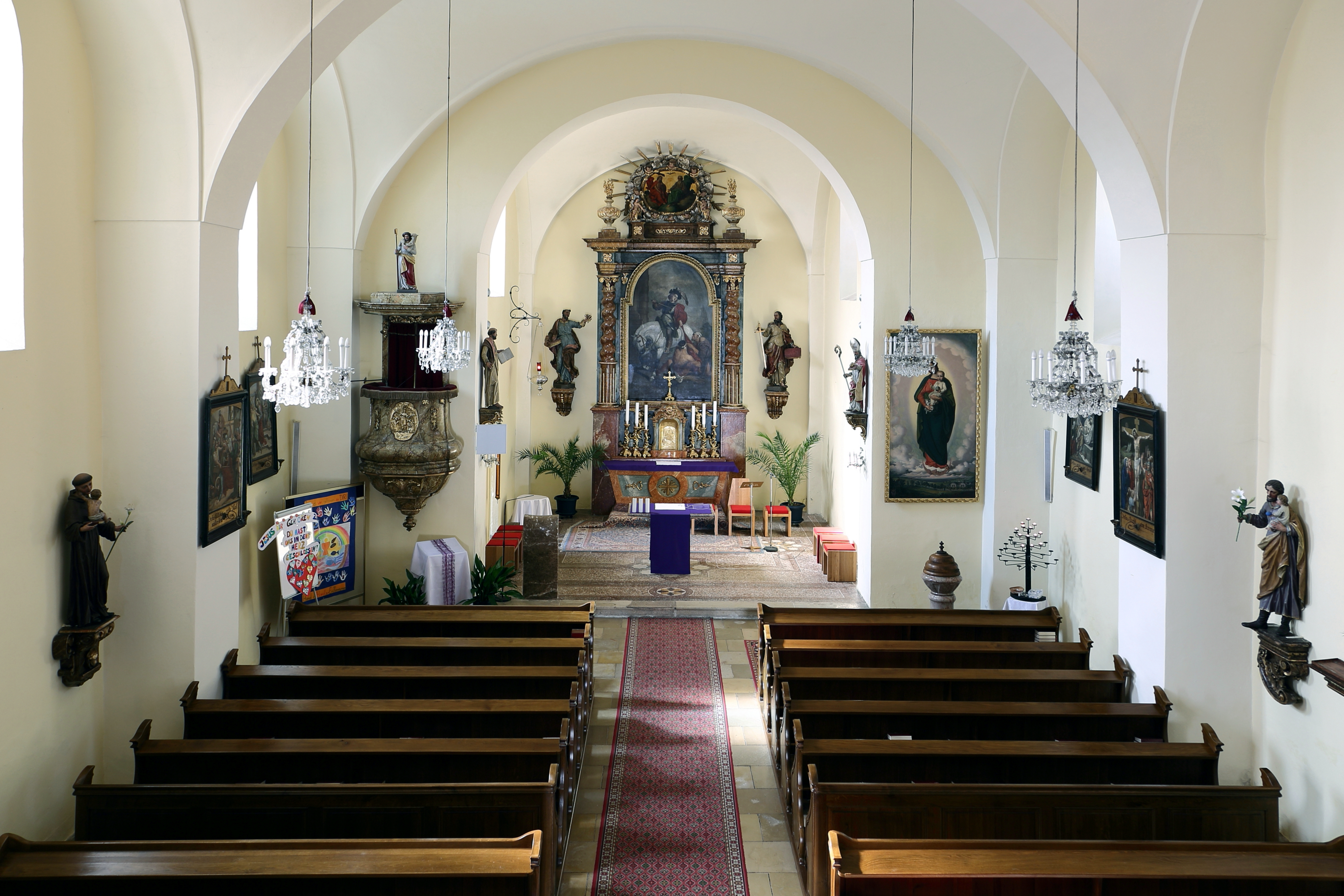 Innenansicht der Pfarrkirche hl. Martin in der niederösterreichischen Marktgemeinde Bad Fischau-Brunn.